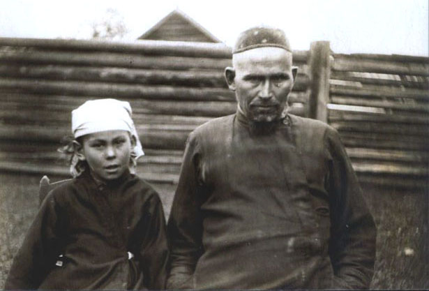 Руденко С.И. Зауральские башкиры